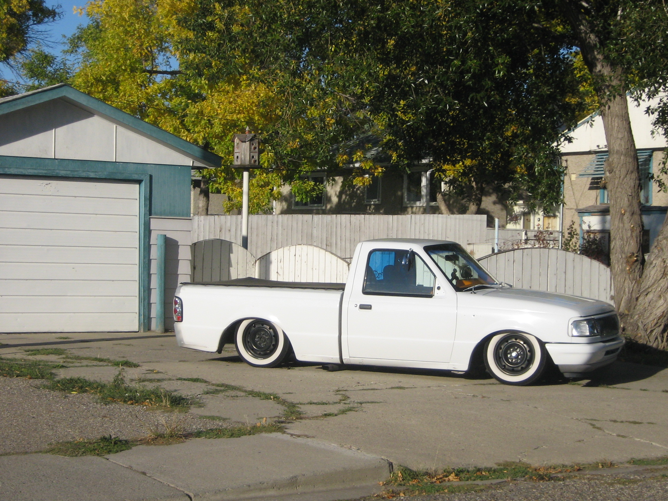 Ford Ranger lowrider